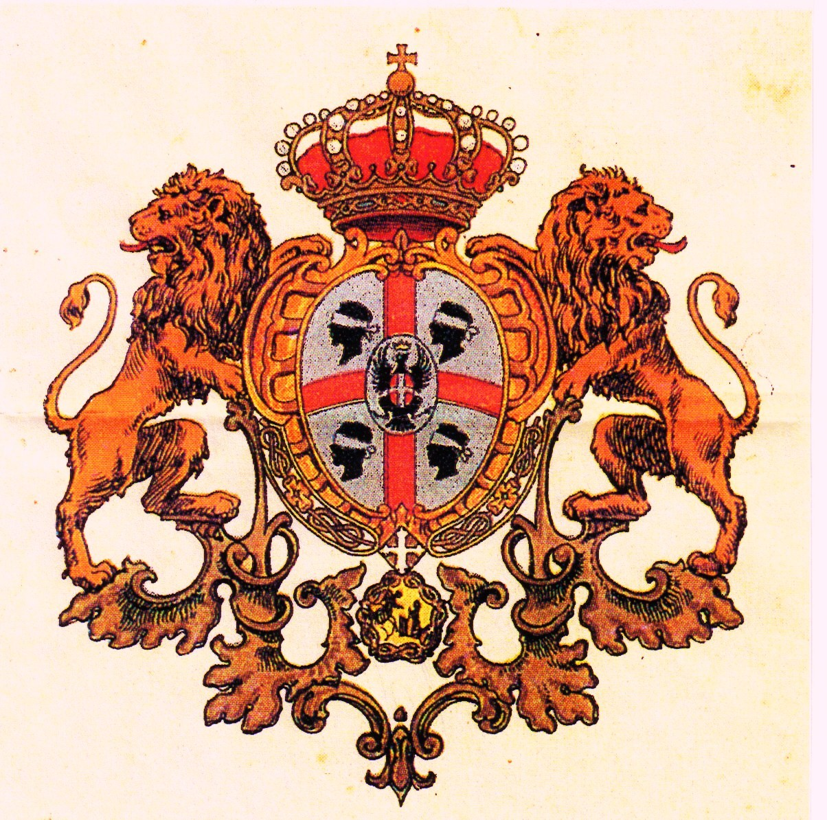 Stemma del Regno di Sardegna nel XIX secolo